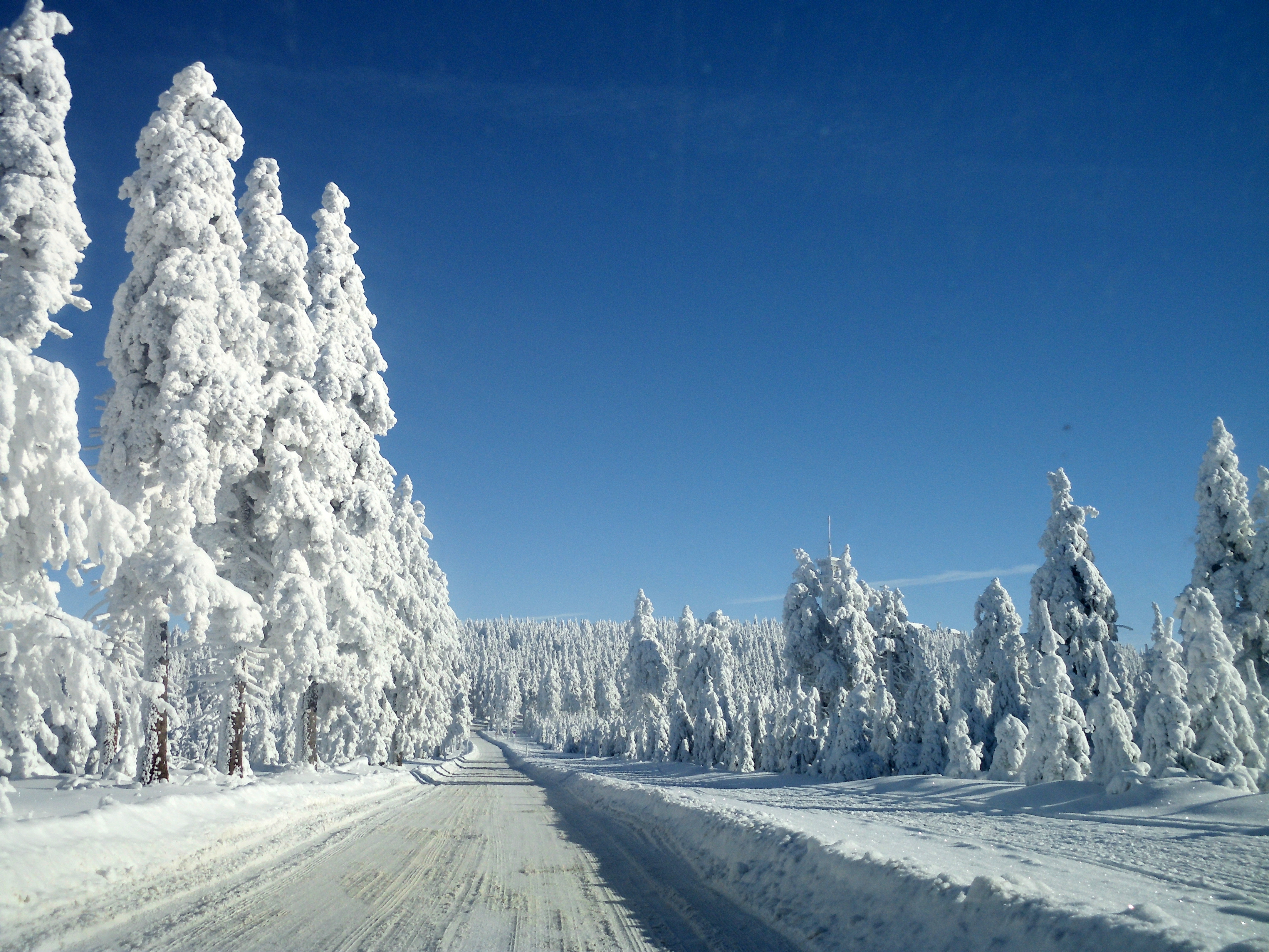 cesta na Klínovec